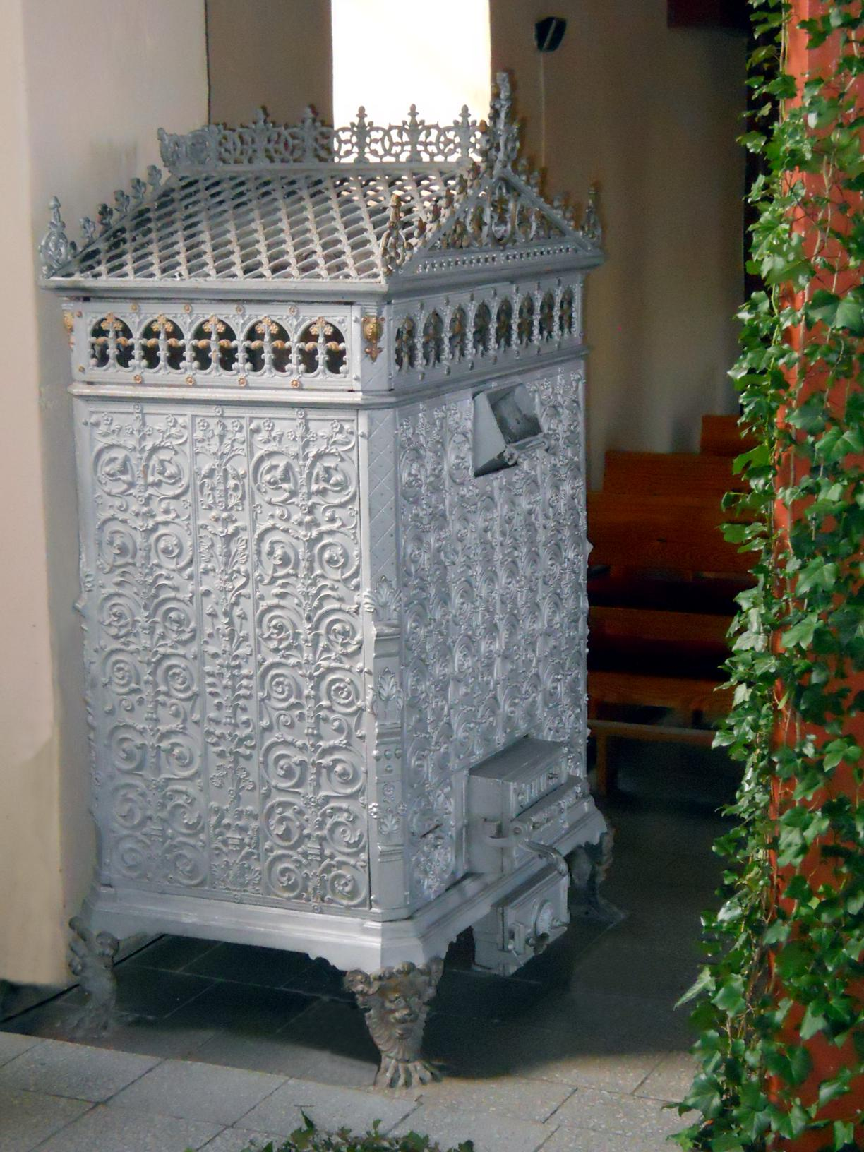 Kościół w Wojcieszycach. Piec żeliwny.